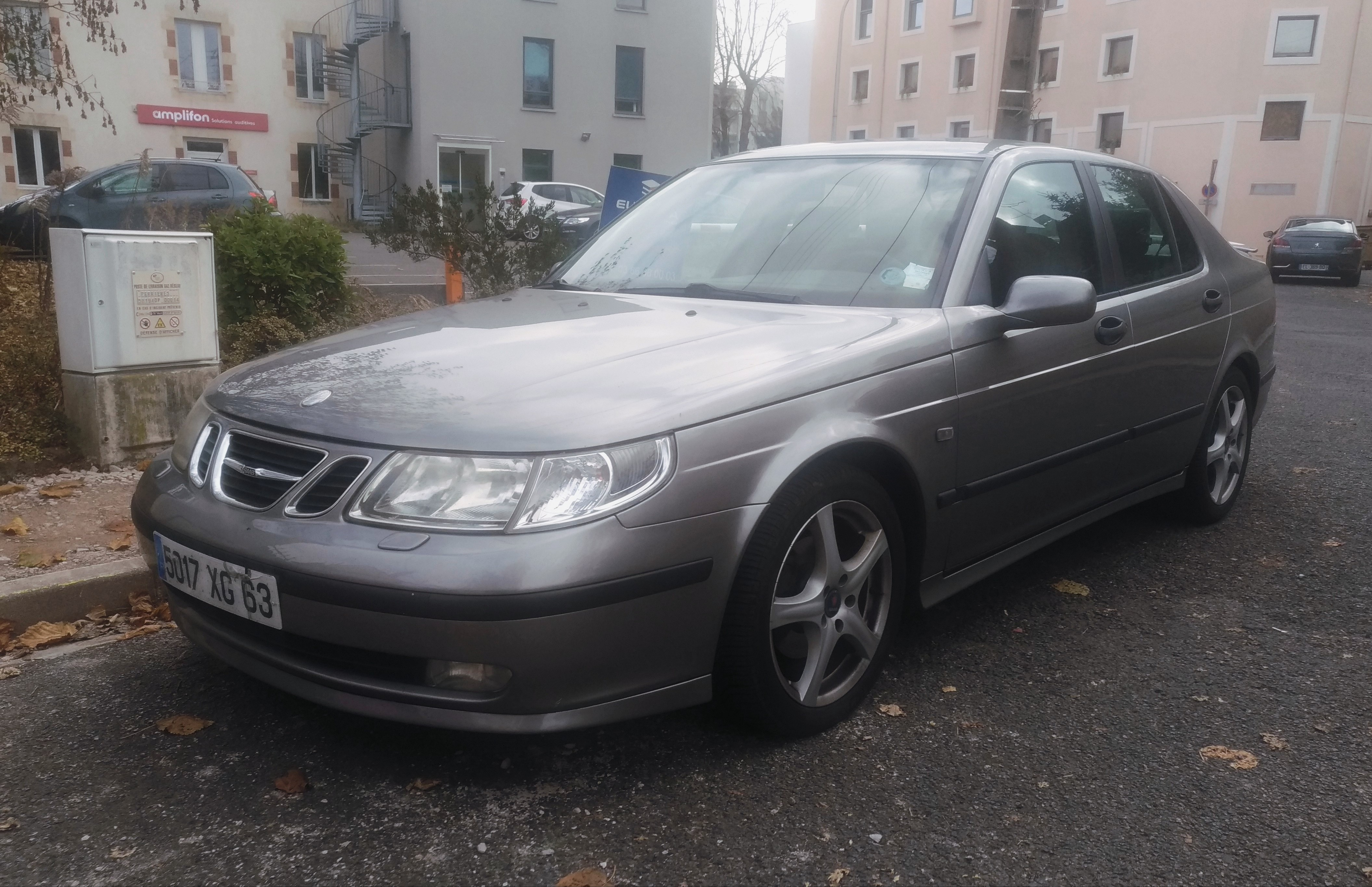 Saab 9.5